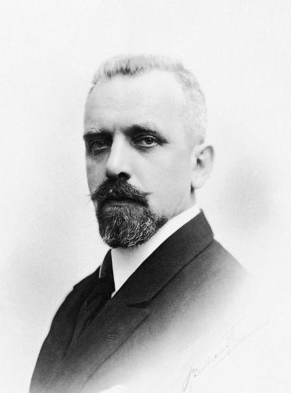 Карл Энкель, министр иностранных дел Финляндии